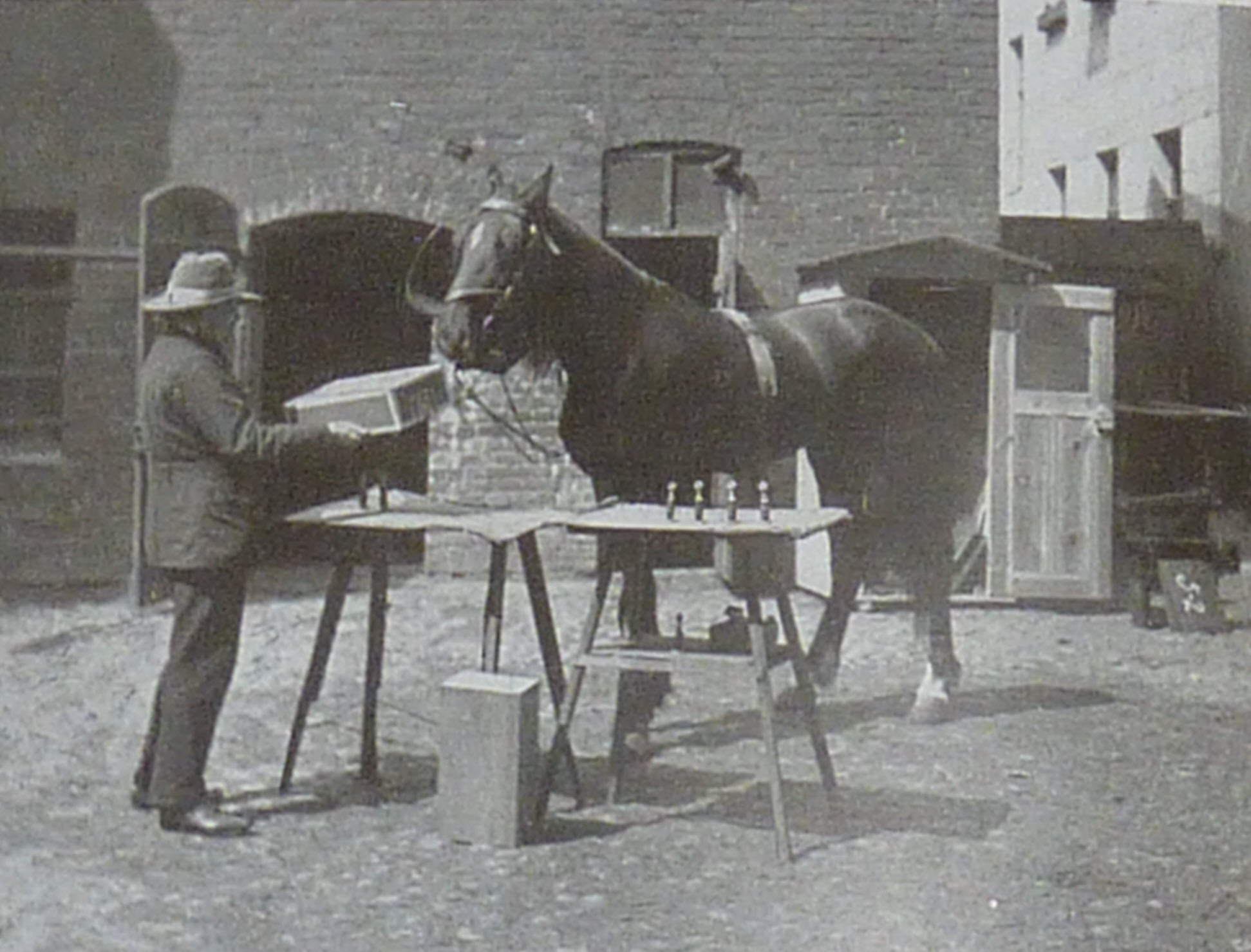 Der kluge Hans lernt: 4 + 2 = 6